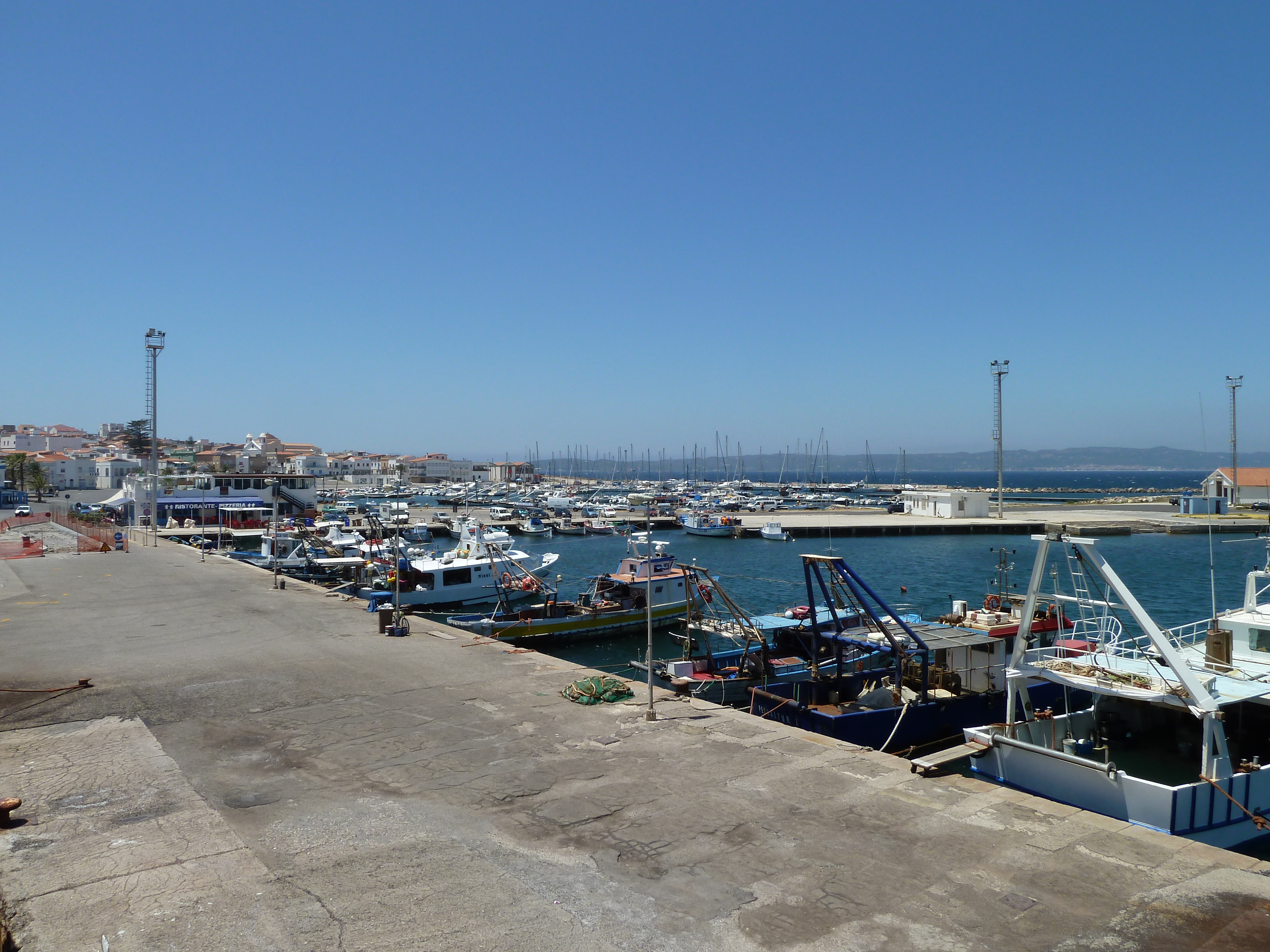 Calasetta